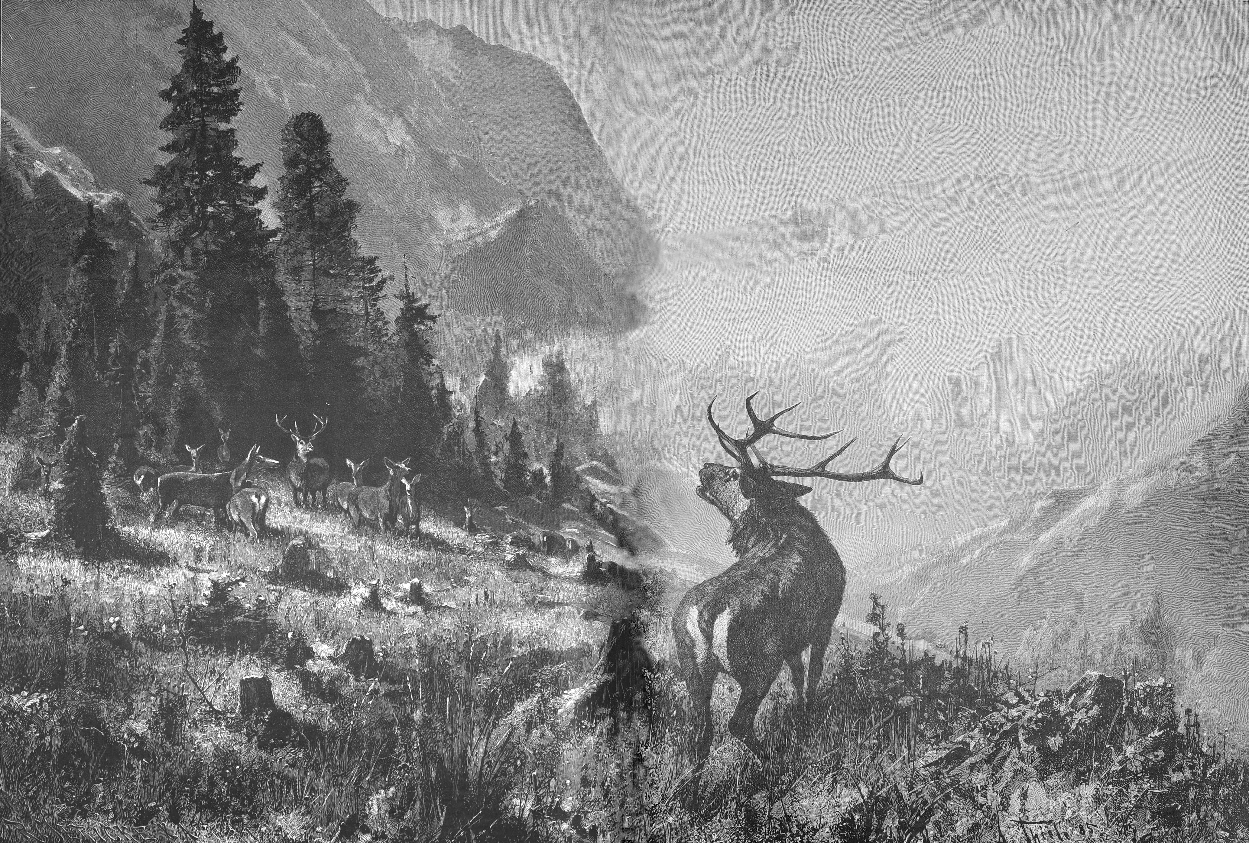 von A. Thiele